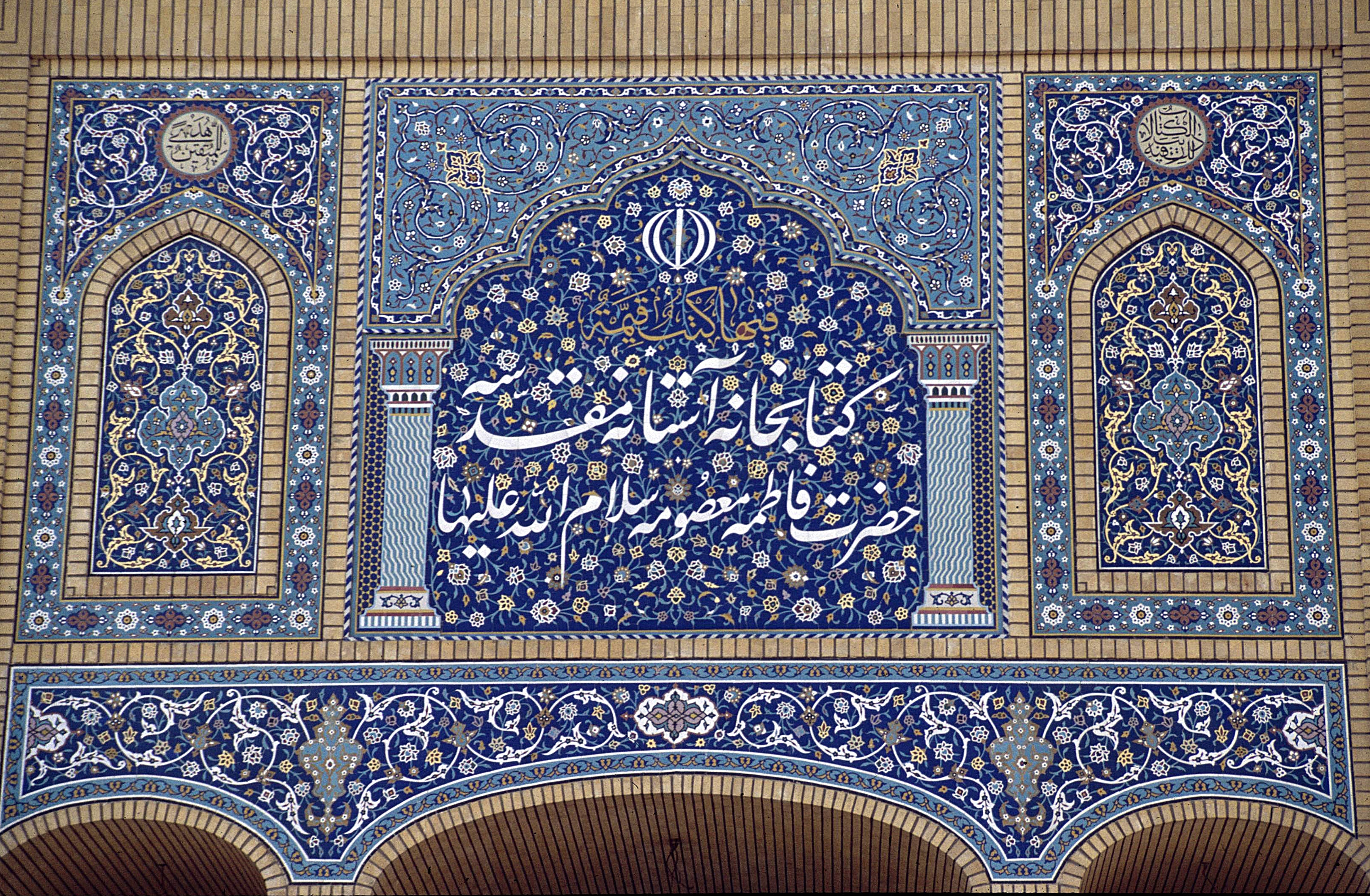 Ghom: Fatima-Heiligtum, Ghom